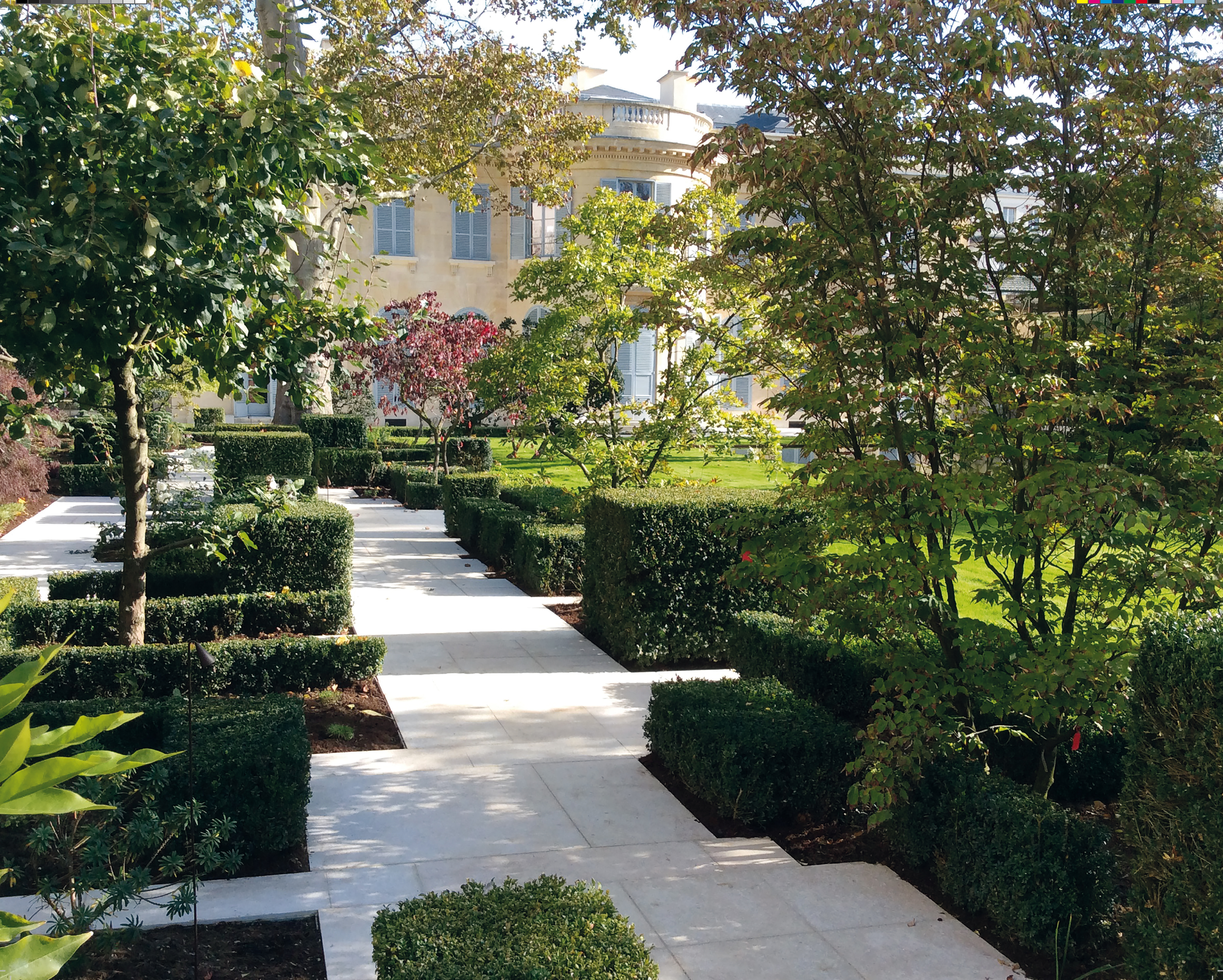 Hôtel Particulier - Bourbon Condé (Paris VII)